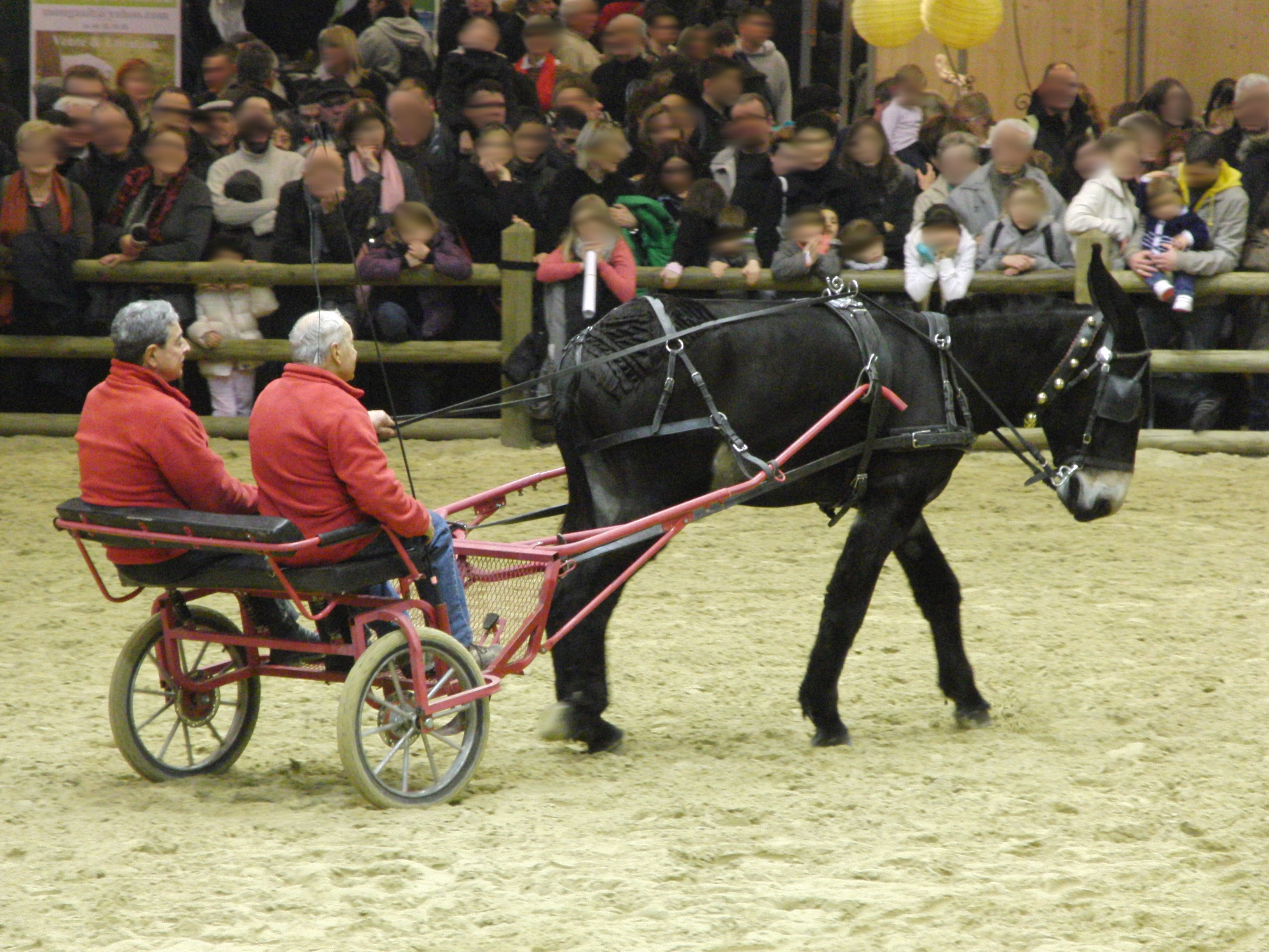 Présentation d'un âne des Pyrénées de type catalan attelé - Salon international de l'agriculture 2013, Paris, France